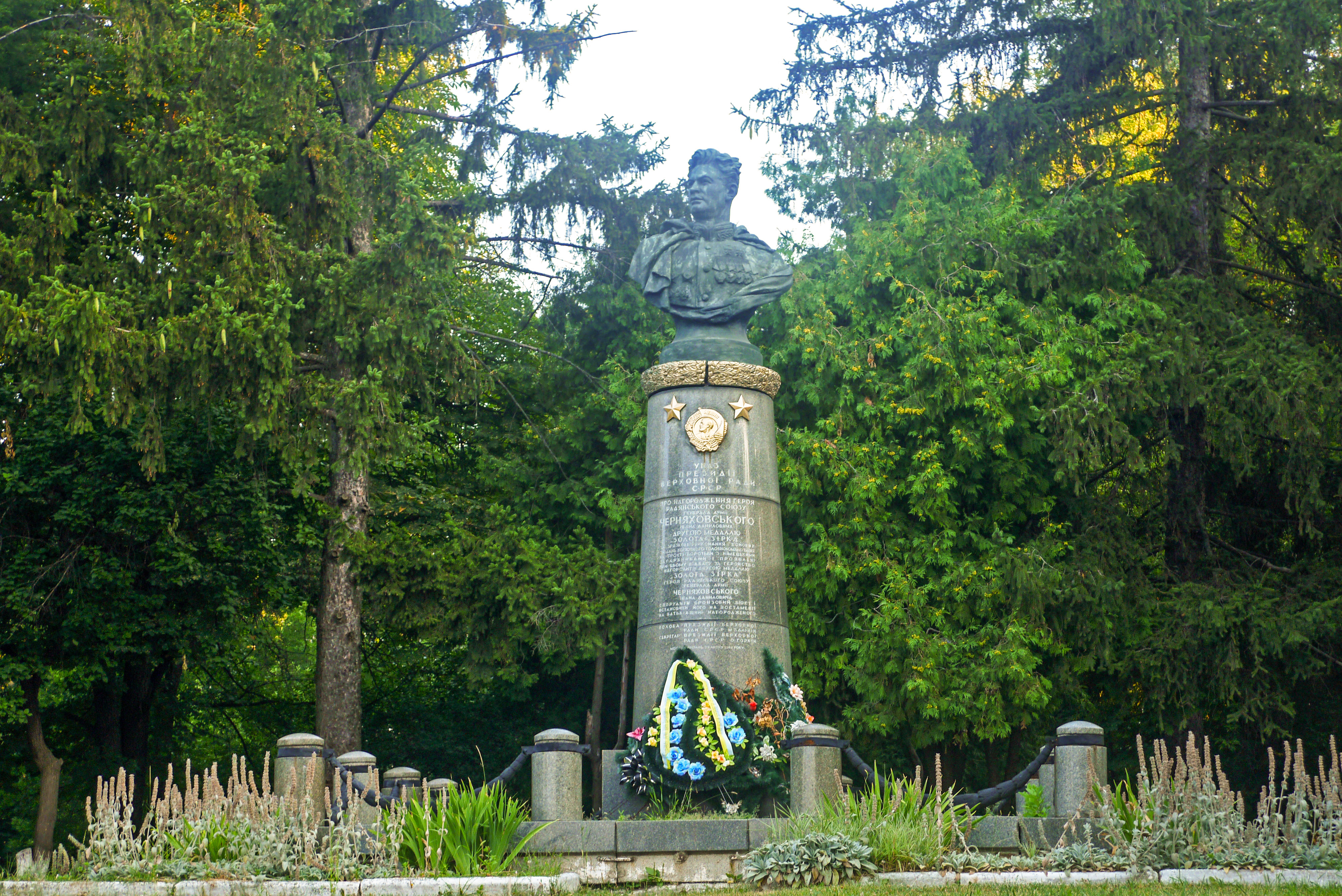 Пам'ятник Черняховському І. Д., Умань, сквер на розі вул. Садової та Гоголя